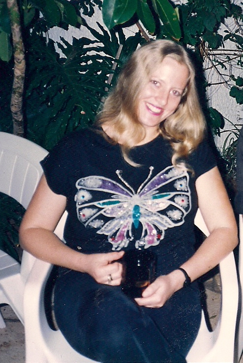 נורית בת-שחר צפריר